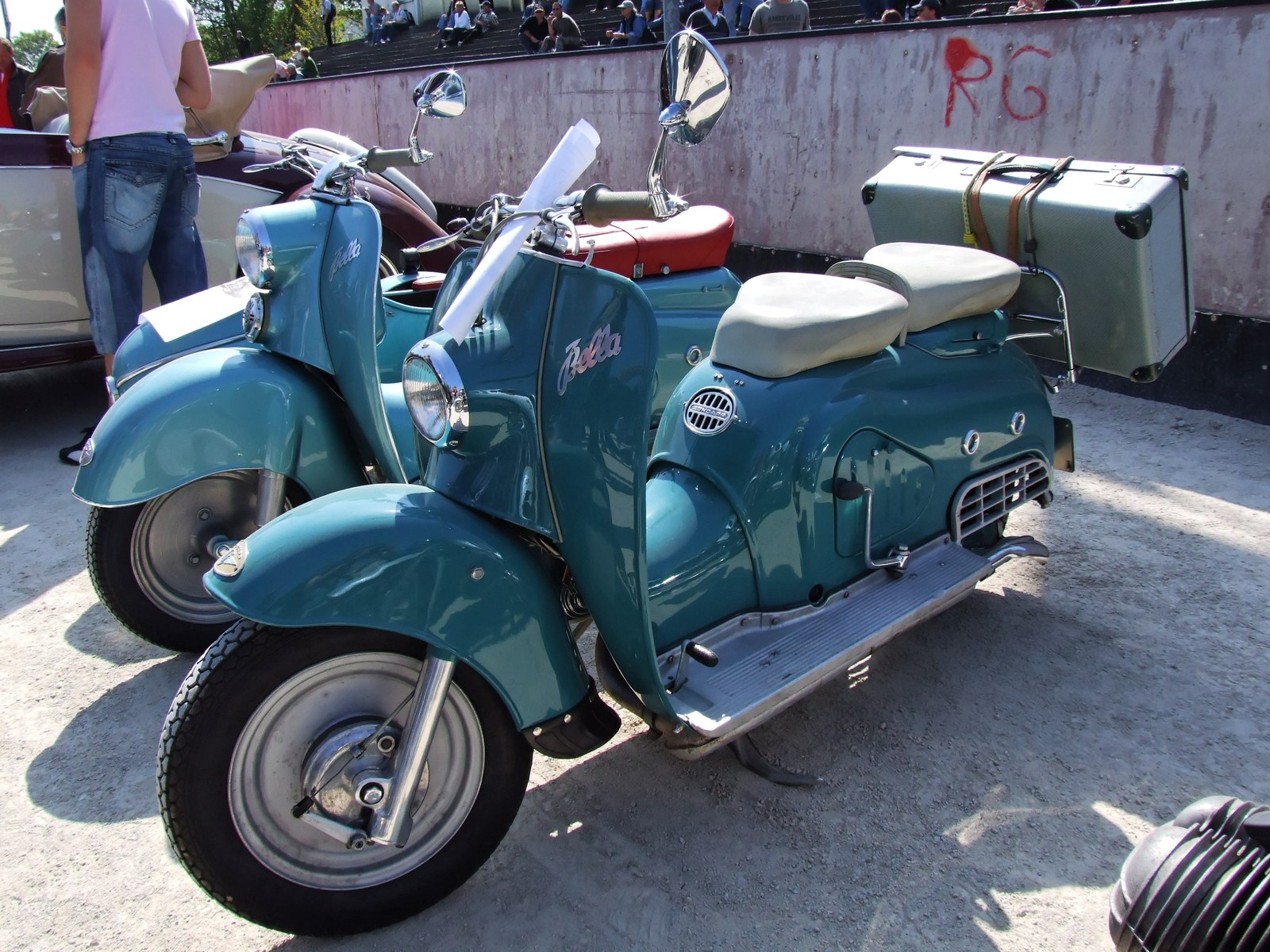 Quelle: selbst fotografiert, 04/2007 Fotograf: Späth Chr.